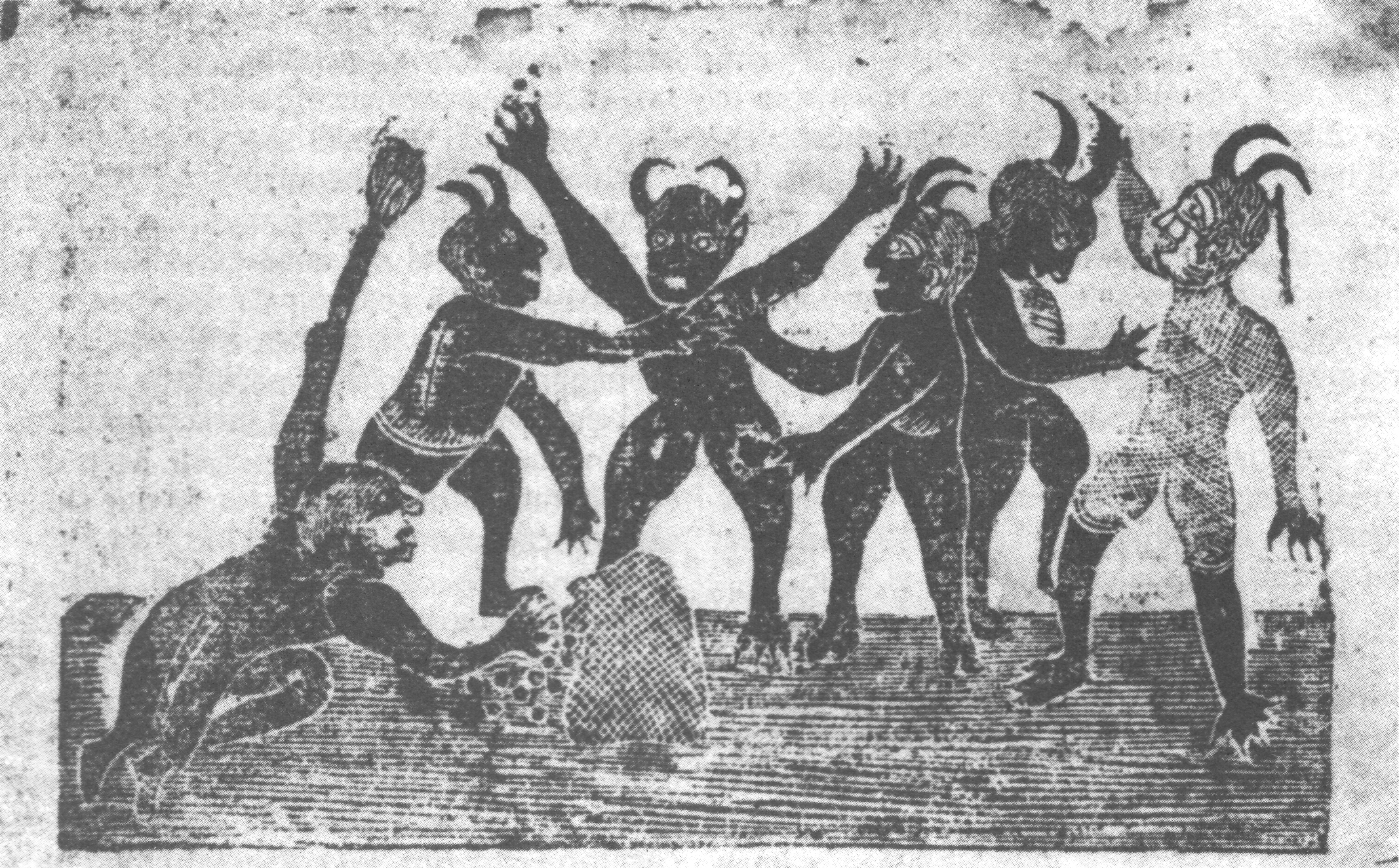 Grabado aparecido en el periódico ilustrado de Uruguay "La Diablada o el robo de la Bolsa", impreso en 1832 por la Imprenda de la Libertad. En este grabado se parodia al grupo conocido como "Los cinco hermanos" integrado por Lucas Obes y sus cuñados Nicolás de Herrera, José Longinos Ellauri, Julián Álvarez y Juan Andrés Gelly sumado a Santiágo Vázquez quien colaboró estrechamente con ellos mostrandolos como diablos vaciando una bolsa de dinero. Debajo del título de la publicación estaba escrito el encabezado "Ya lo veis - Para el robo - Somos seis".